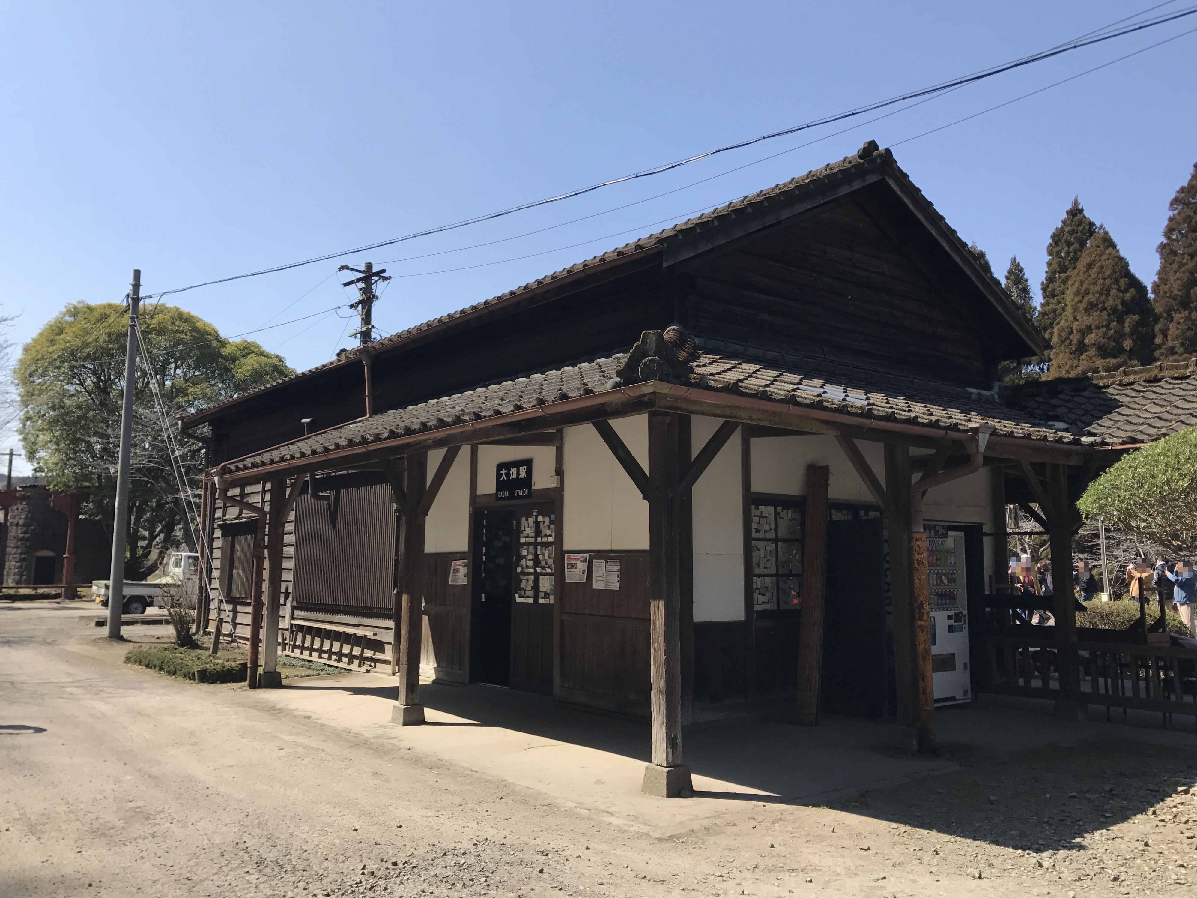 大畑駅駅舎。名刺がいっぱい貼り付けられる